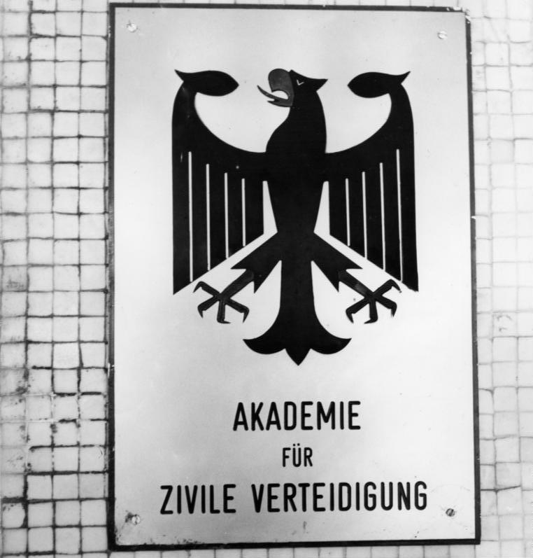 Amtsschild Akademie für Zivile Verteidigung Wappen AZV [Wappen der Akademie für zivile Verteidigung mit Bundesadler (Amtsschild)]